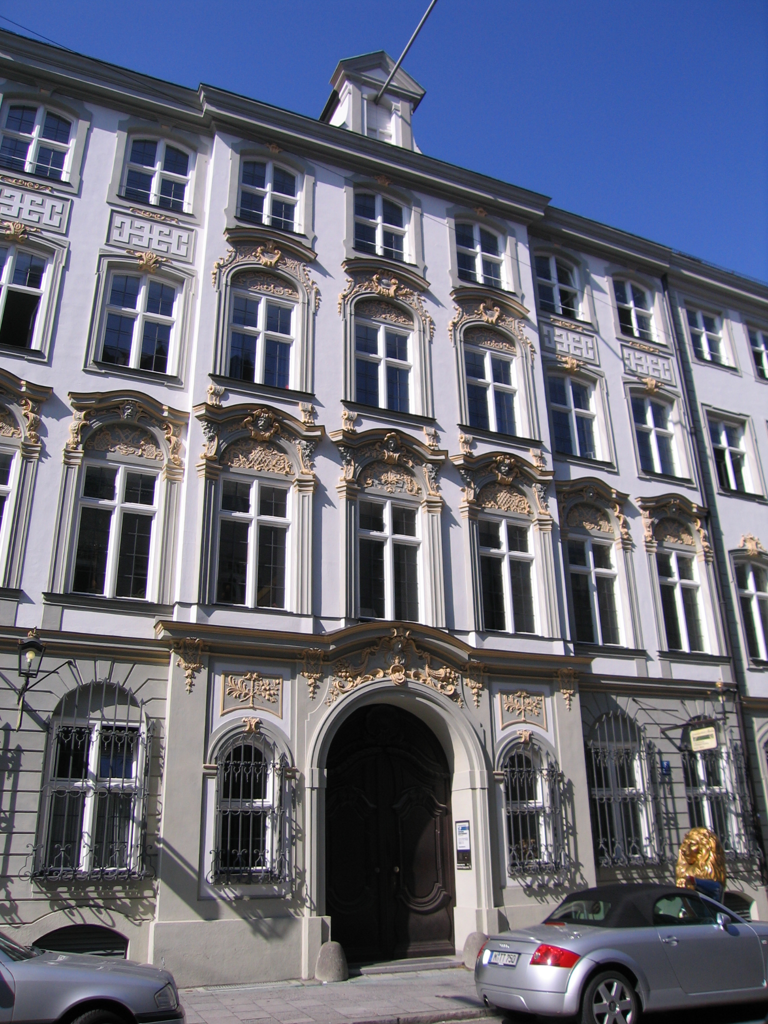 Palais Lerchenfeld, Munich